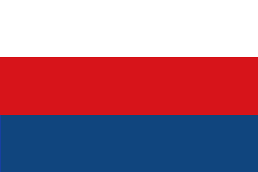 Jedna z verzí vlajky Moravy v podobě bílo-červeno-modré trikolóry. Používali ji například zástupci česky mluvících Moravanů na Slovanském sjezdu v roce 1848.